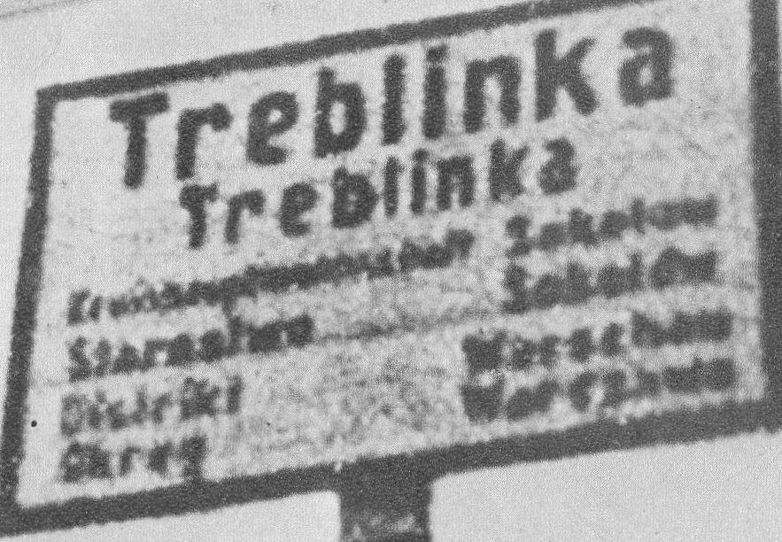 Wieś Treblinka. Polsko-niemiecka tablica informacyjna